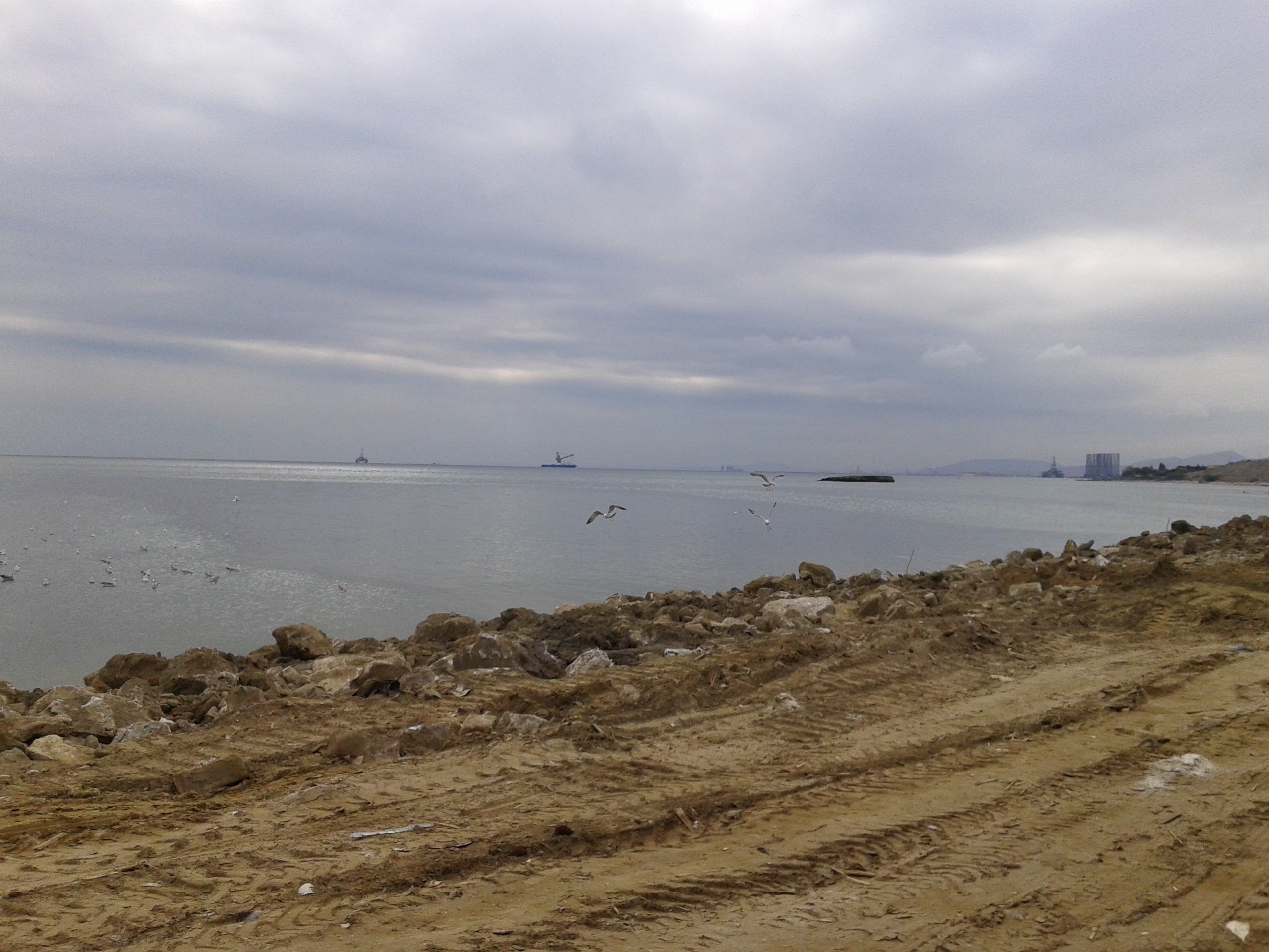 Deniz 2